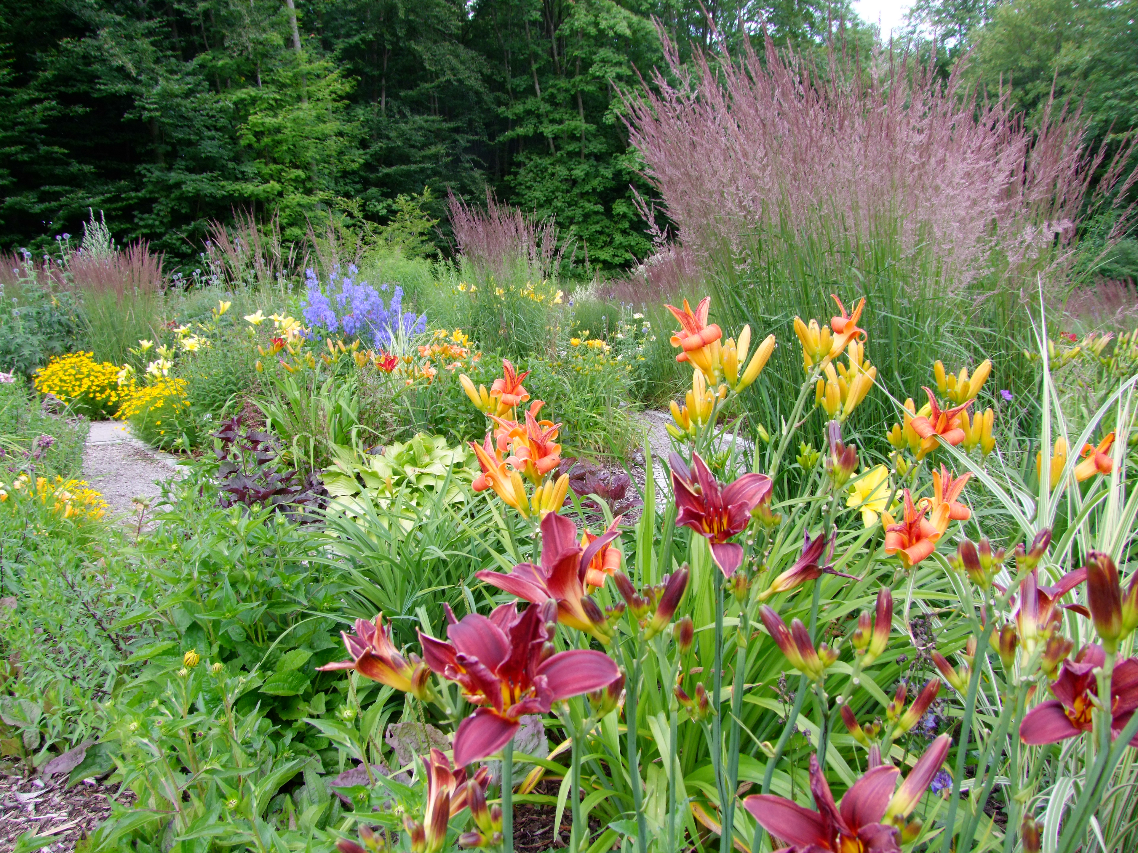 Taglilengarten